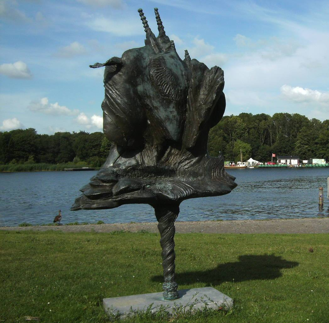 'Wind in de zeilen' brons door Fioen Blaisse 1985